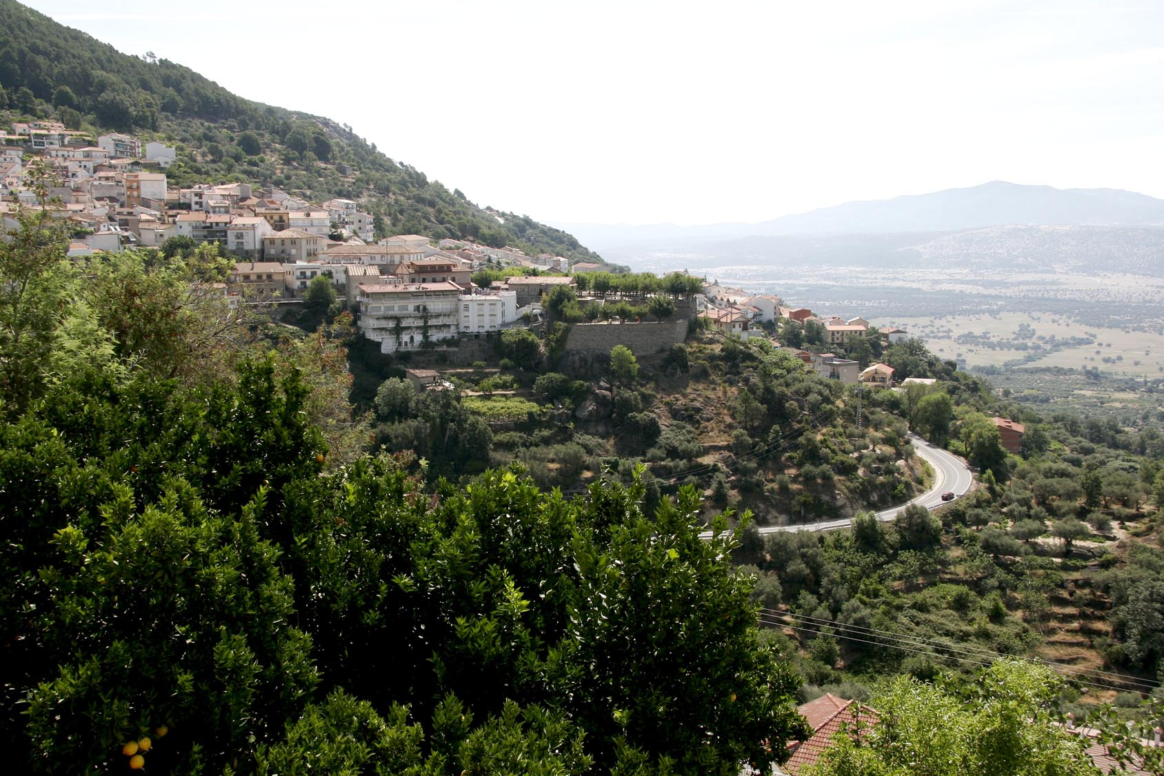 Pedro Bernardo, Ávila (España)